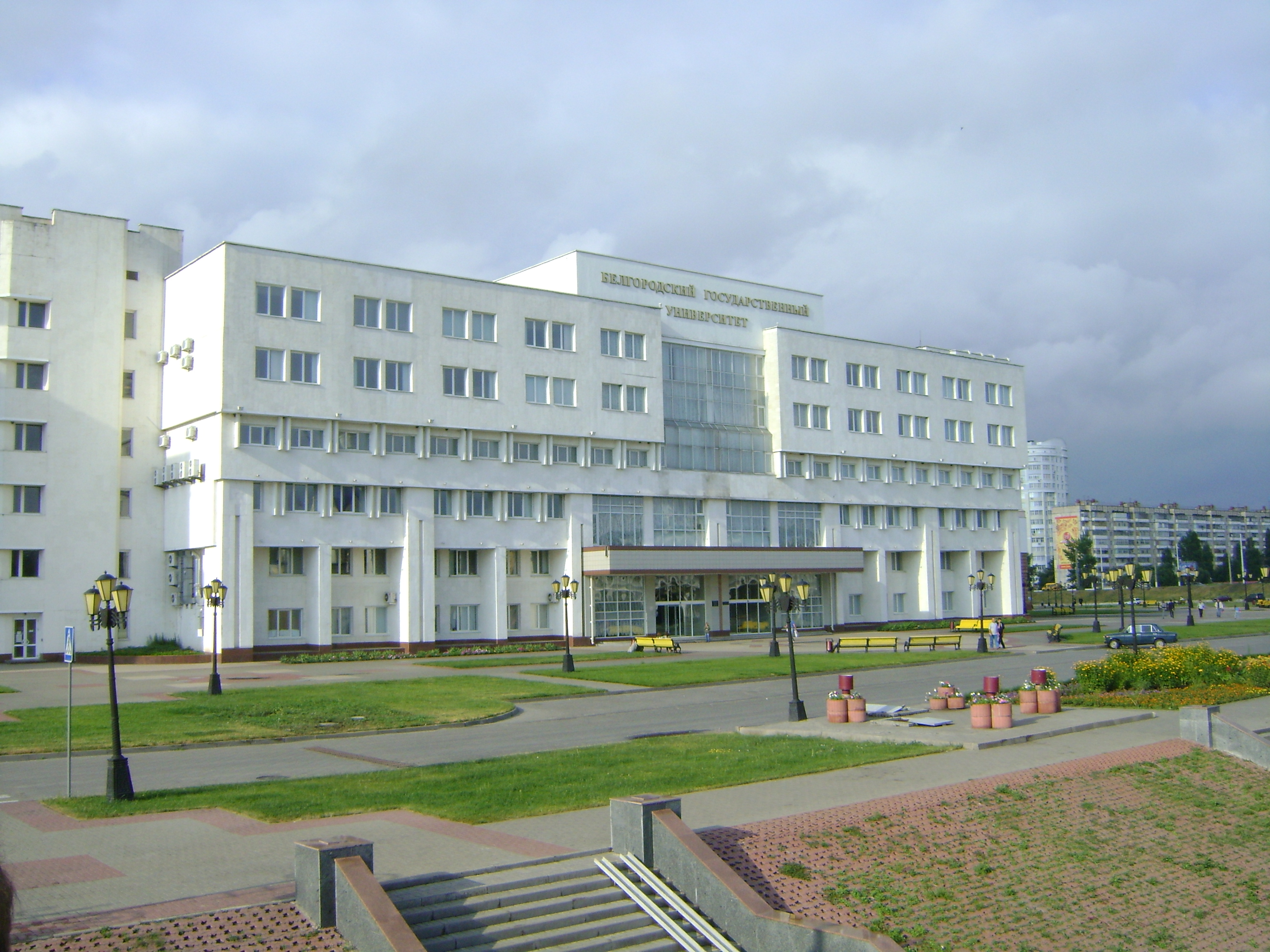 Вид на здание нового корпуса БелГУ